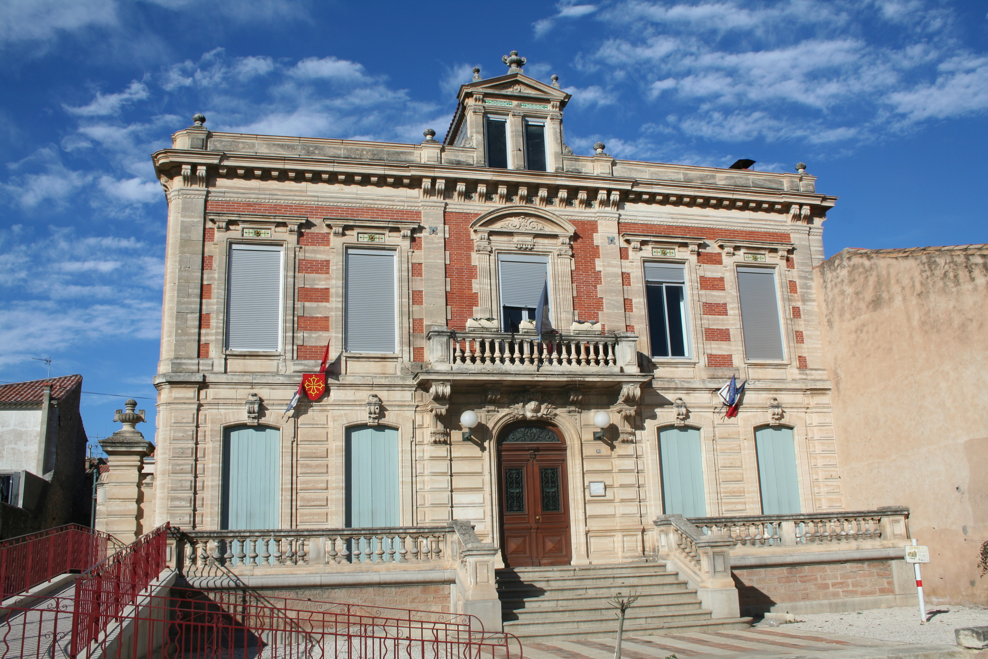 Puisserguier (Hérault) - mairie.